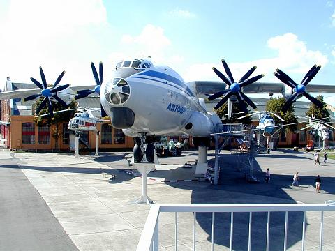 Antonov 22 eigene Aufnahme vom 01.09.2004. Technik-Museum Speyer Lizenz: GNU-FDL